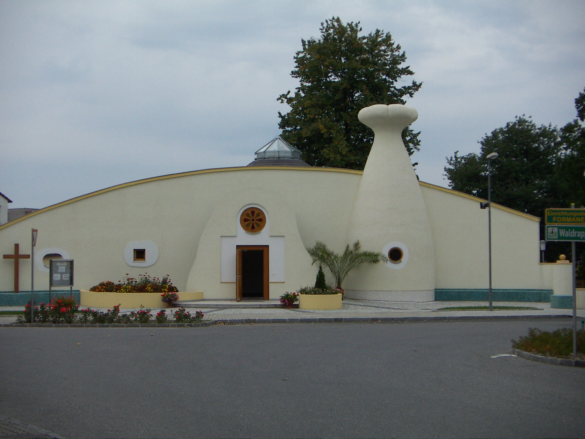 Evangelische Kirche Waidhofen an der Thaya, Architekt Efthymios Warlamis